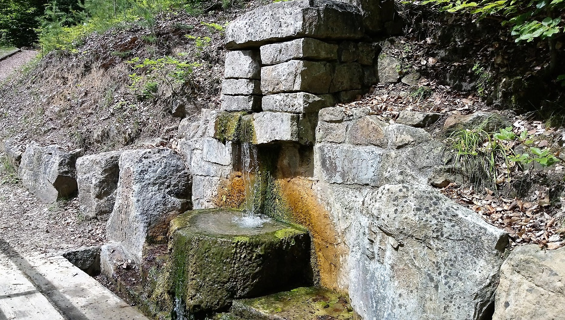 Walferdange, Grünewald: qanat "Raschpëtzer". Écoulement symbolique et apparent de l’eau. En 2000, la fin du canal secondaire été reconstruite afin de montrer la construction du canal romain, tel qu'il se présente à l'intérieur de la colline, sur une longueur de 600 m: murs latéraux construits à sec, couverts de pierres plates et de gravier.